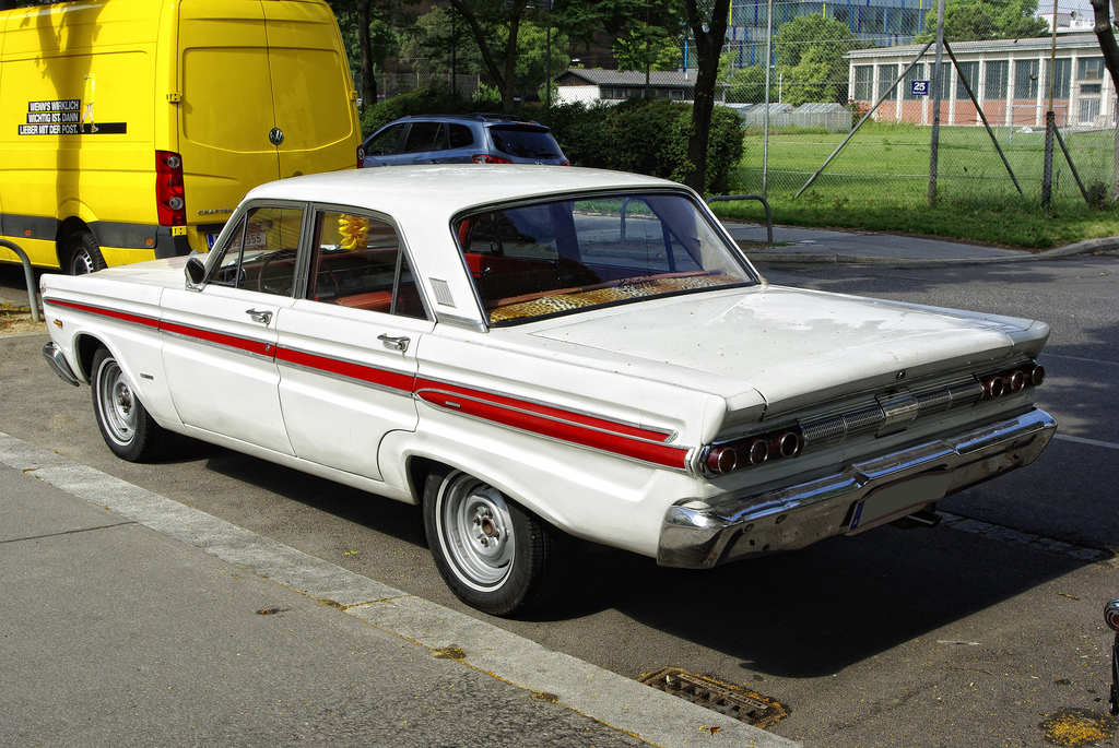 Mercury Comet auf Basis des Ford Fairlane